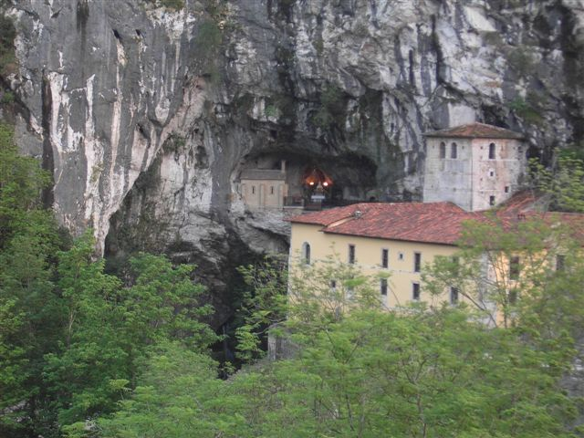 Covadonga, Cueva de Santa María. Foto personal Basil 11:43 3 may 2006 (CEST) bajo Licencia GFDL.